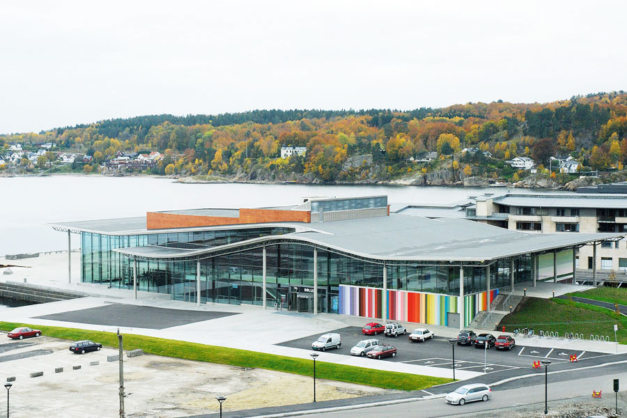 Bølgen kulturhus ved Fritzøe Brygge, Larvik